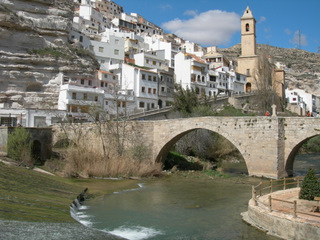 Vista de Alcalá del Júcar